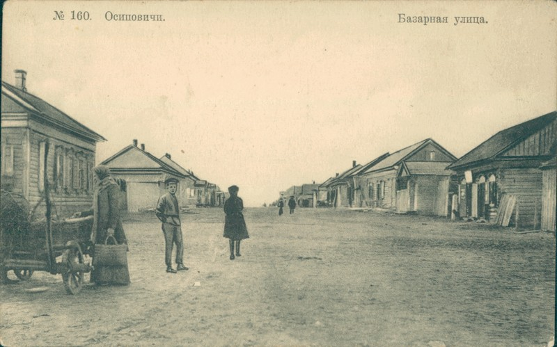 Беларуская (тарашкевіца): Асіпавічы (Asipavičy), вуліца Рынкавая (vulica Rynkavaja)